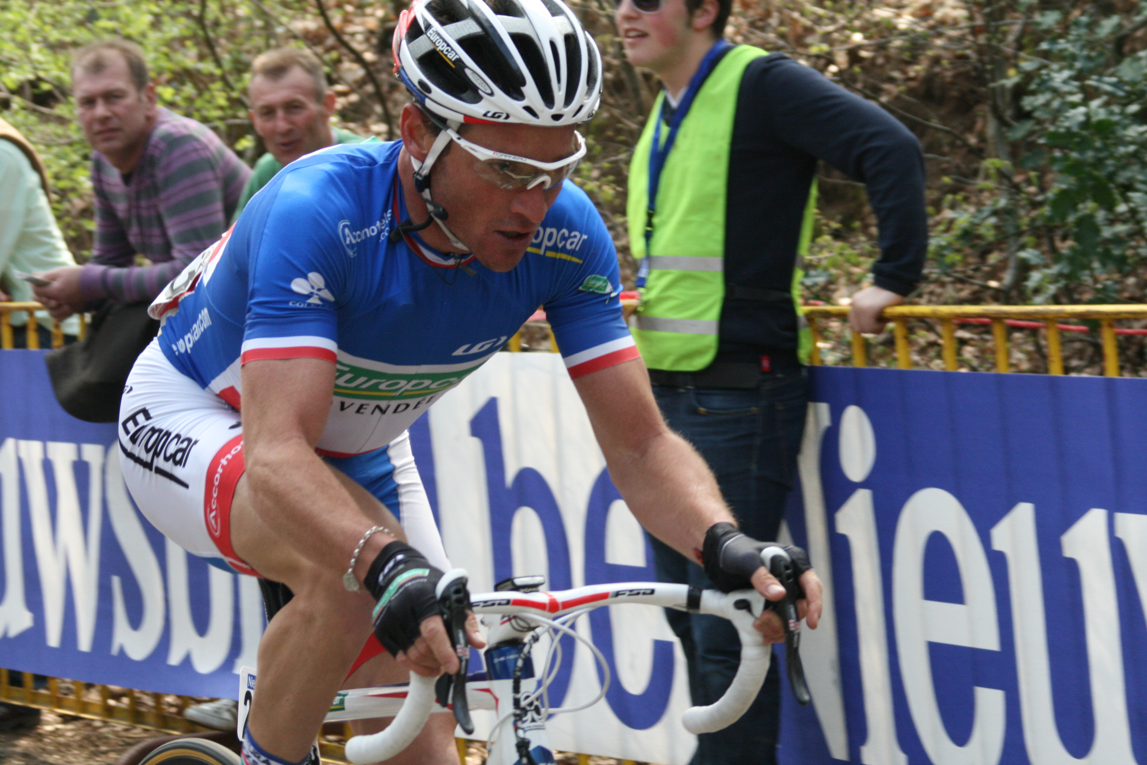 Gent-Wevelgem 2011, Kemmelberg